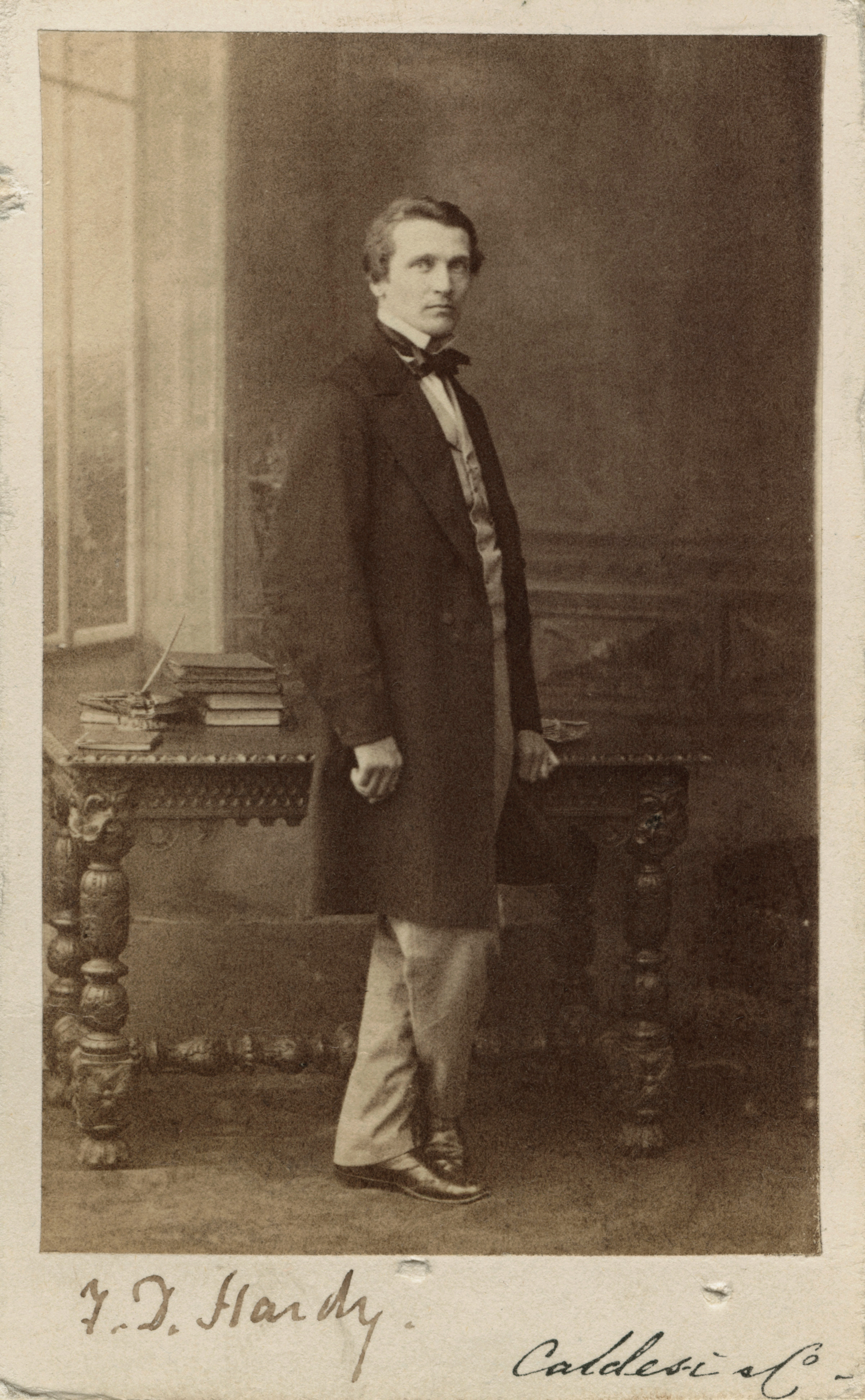 Frederick Daniel Hardy (1827-1911), albumen carte-de-visite